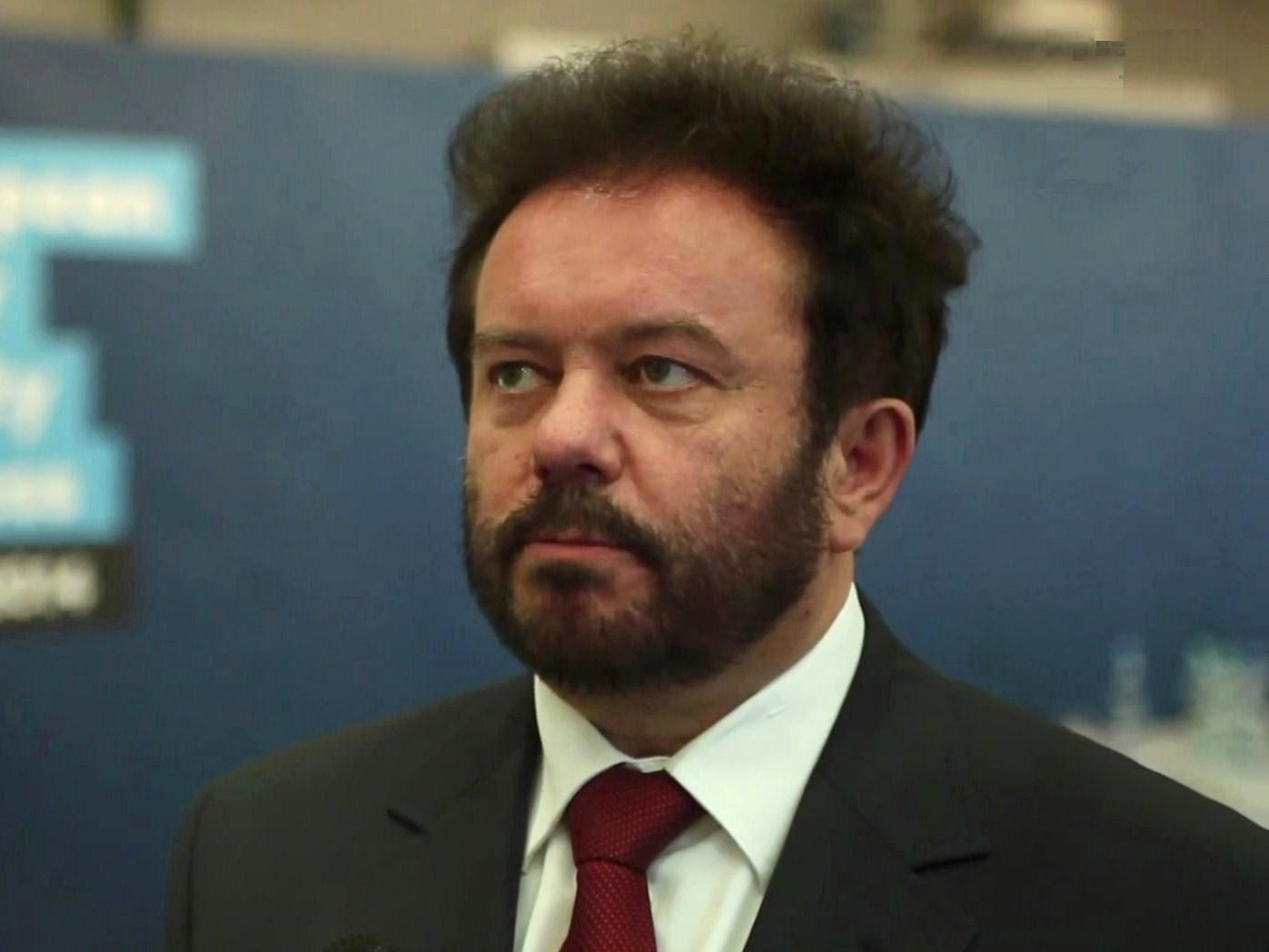 Radosław Mleczko, historyk sztuki, nauczyciel i urzędnik państwowy.